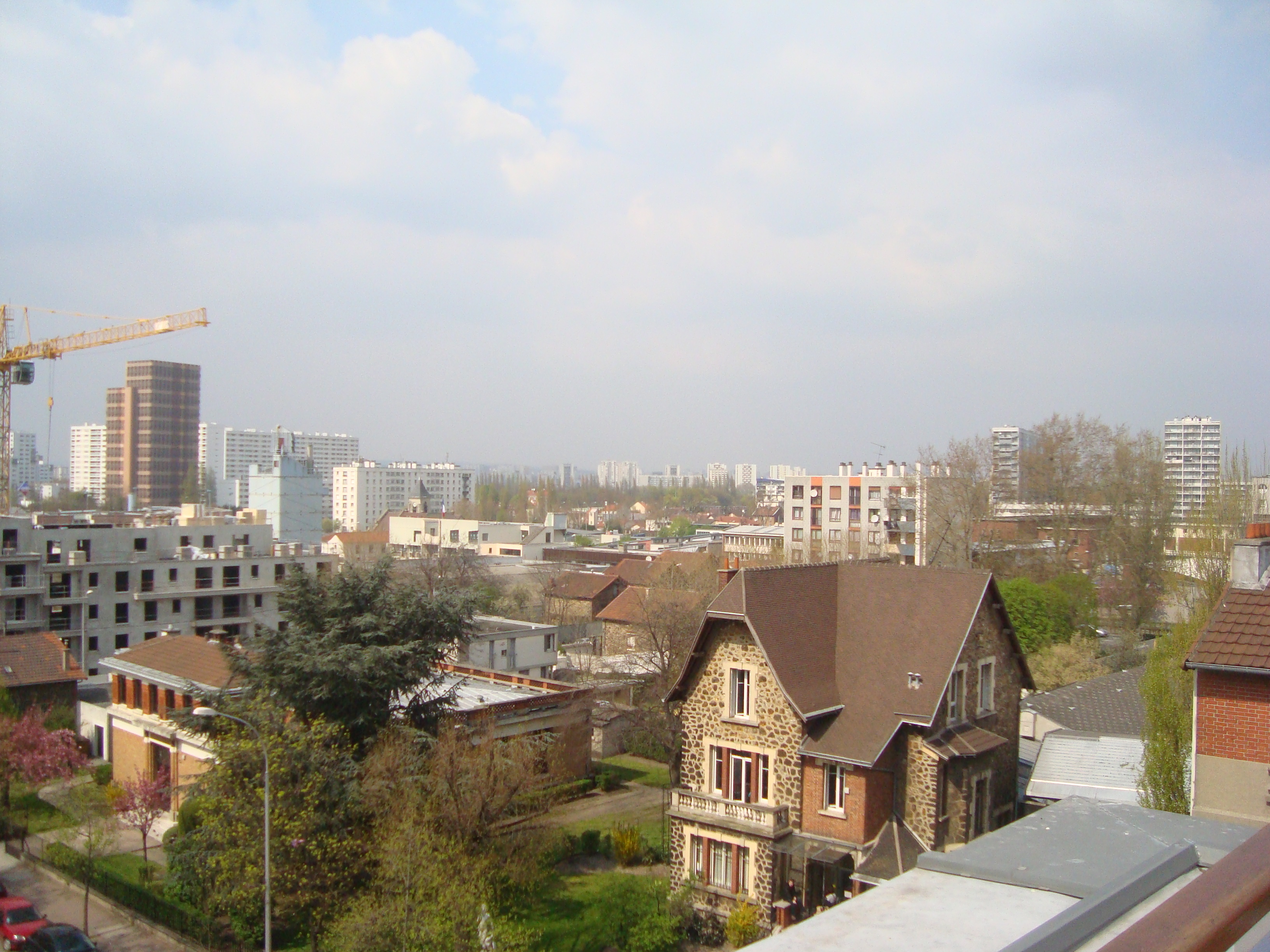 Vue des quartiers nord de La Courneuve prise du 3e étage de l'Hôtel de Ville